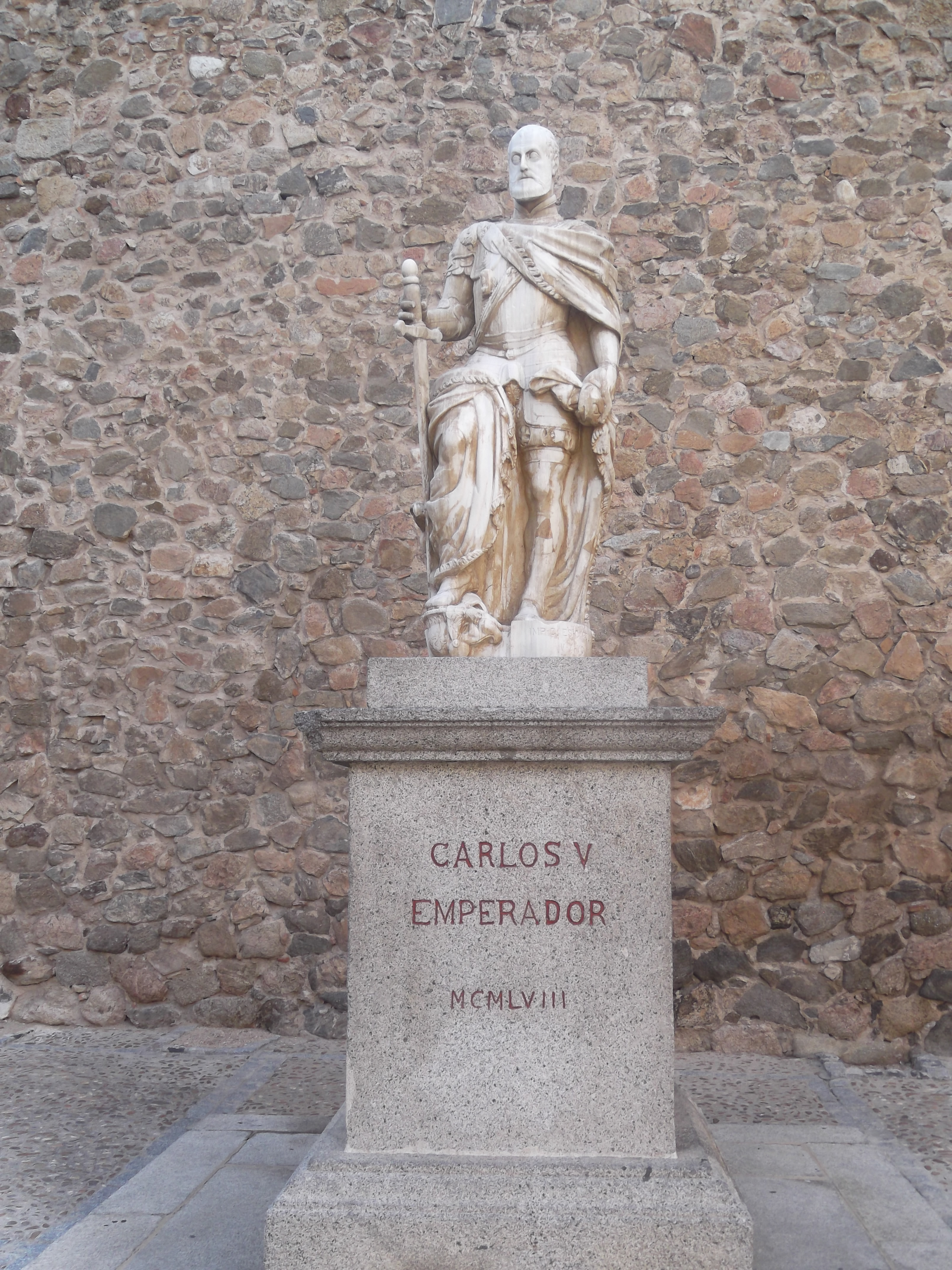 تمثال لكارلوس الخامس في طليطلة.